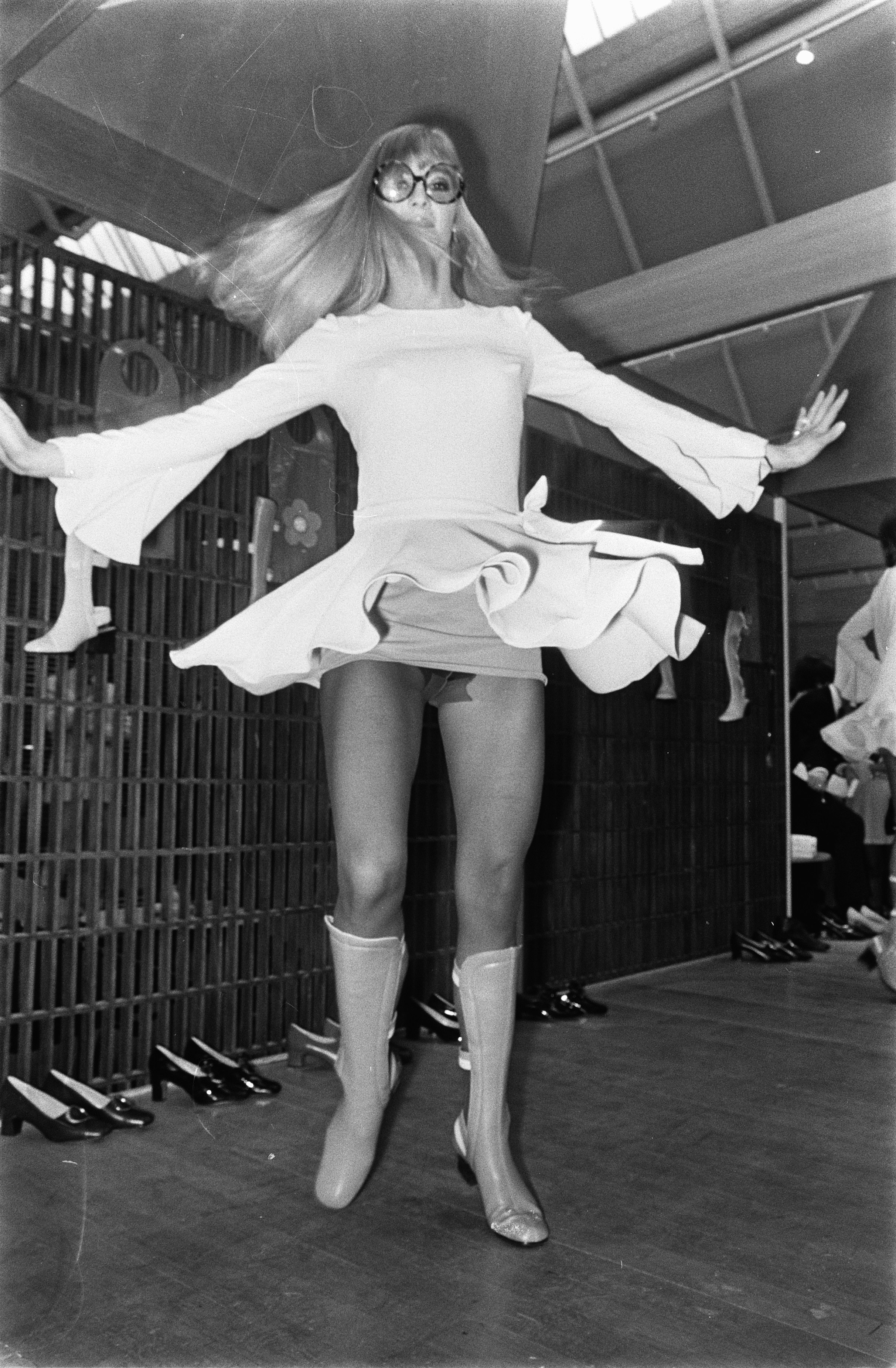 Collectie / Archief : Fotocollectie Anefo Reportage / Serie : [ onbekend ] Beschrijving : Mary Quant toont haar zomerlaarzen op schoenenbeurs te Utrecht de show Datum : 24 maart 1969 Locatie : Utrecht Trefwoorden : schoenenbeurzen Fotograaf : Nijs, Jac. de / Anefo Auteursrechthebbende : Nationaal Archief Materiaalsoort : Negatief (zwart/wit) Nummer archiefinventaris : bekijk toegang 2.24.01.05 Bestanddeelnummer : 922-2260